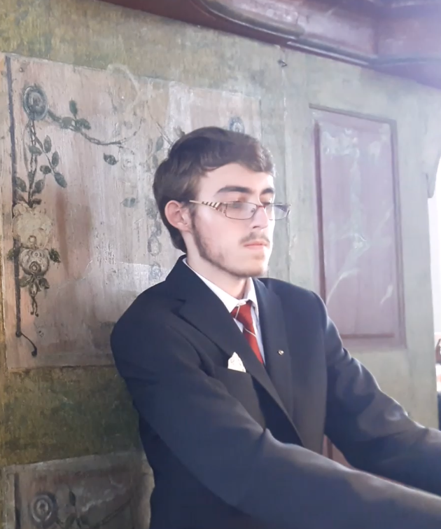 Palkoska (narozený v tomto datu) v Uhlířských Janovicích